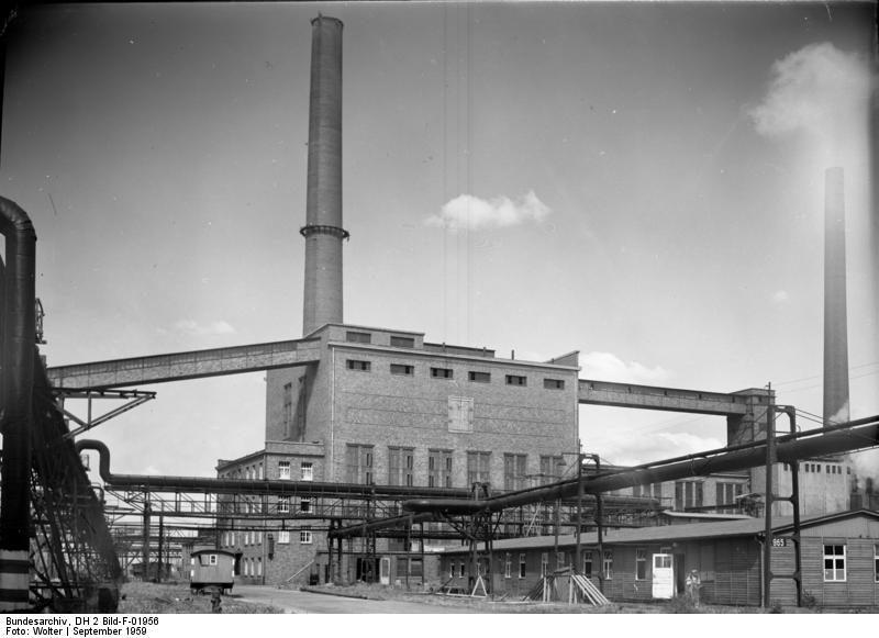 Bitterfeld, Elektrochemisches Kombinat Elektrochemisches Kombinat Bitterfeld Kraftwerk Nord [Bitterfeld.- Kraftwerk Nord des Elektrochemischen Kombinats]